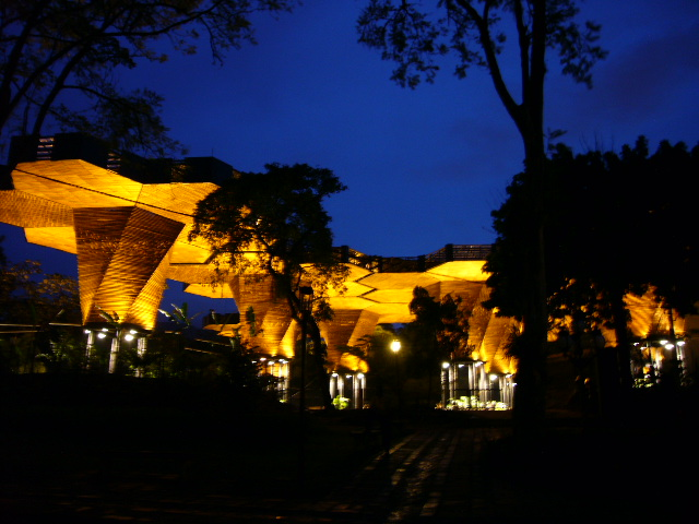 Orquideorama del Jardín Botánico de Medellín, Colombia.